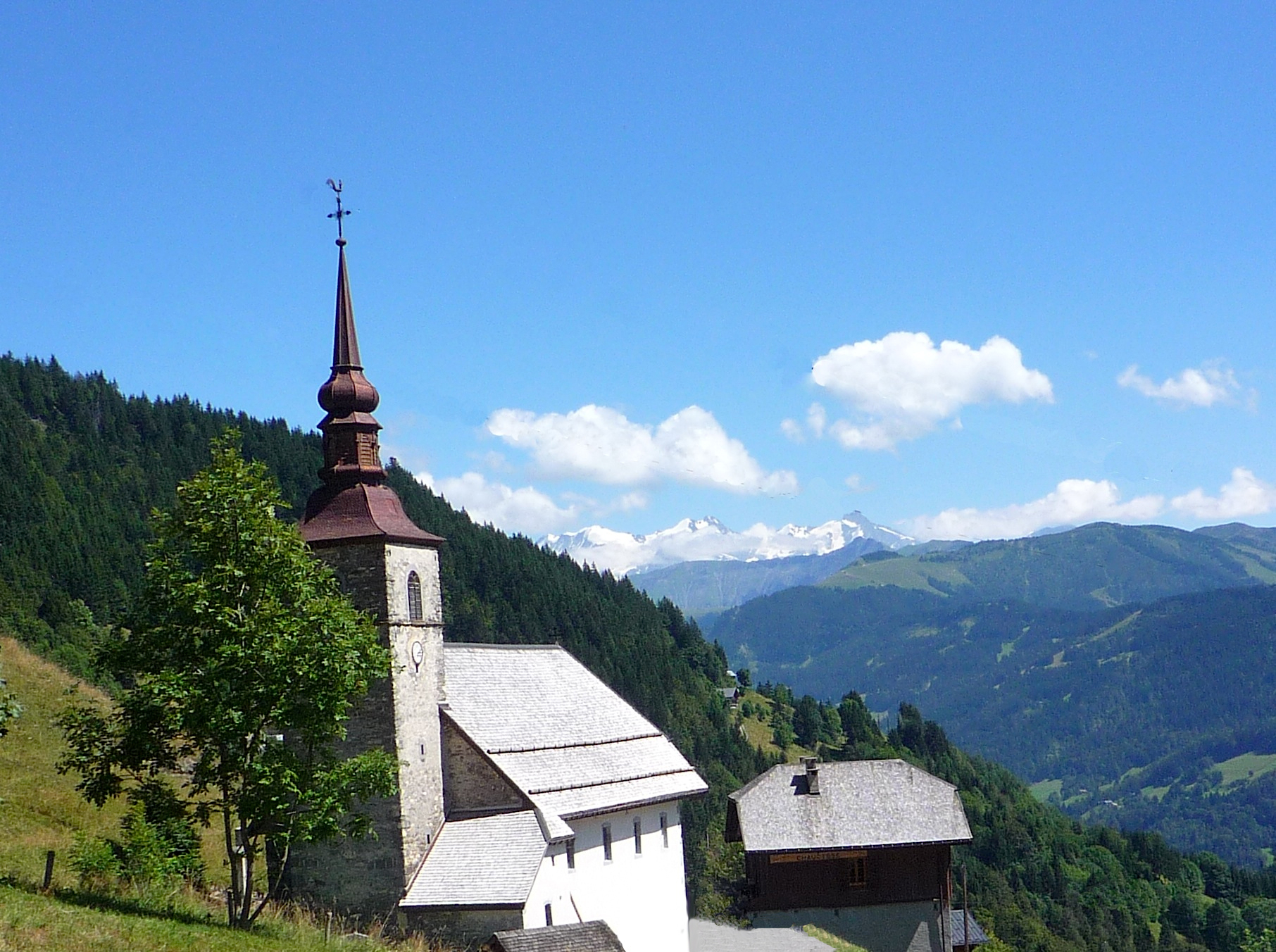 Vue du hameau de Chaucisse et de son Eglise Commune de Saint-Nicolas-la-Chapelle (Savoie) Aout 2013